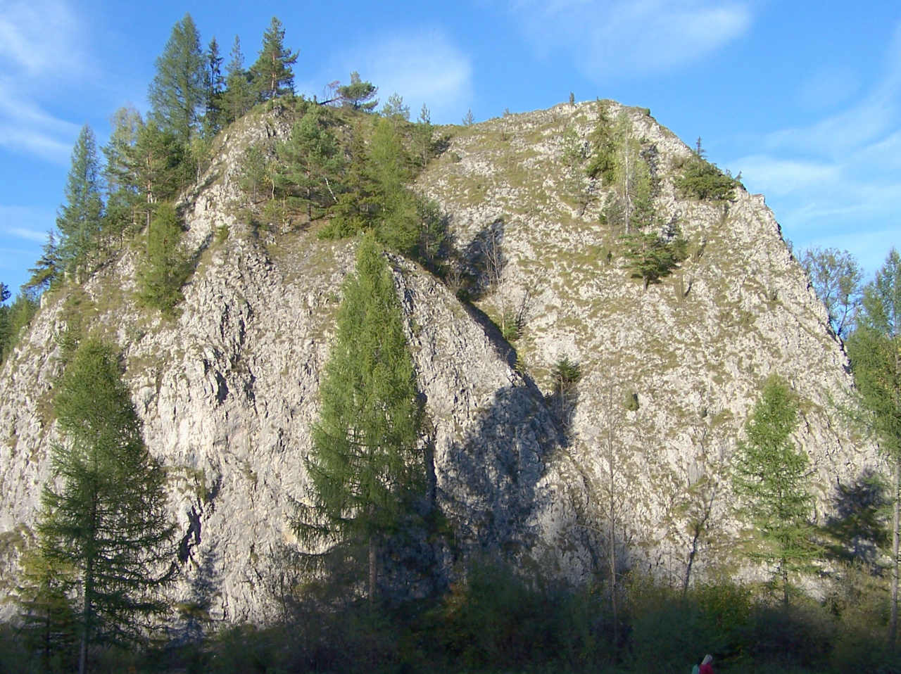 Kociubylska Skała - rezerwat Biała Woda (Pieniny)